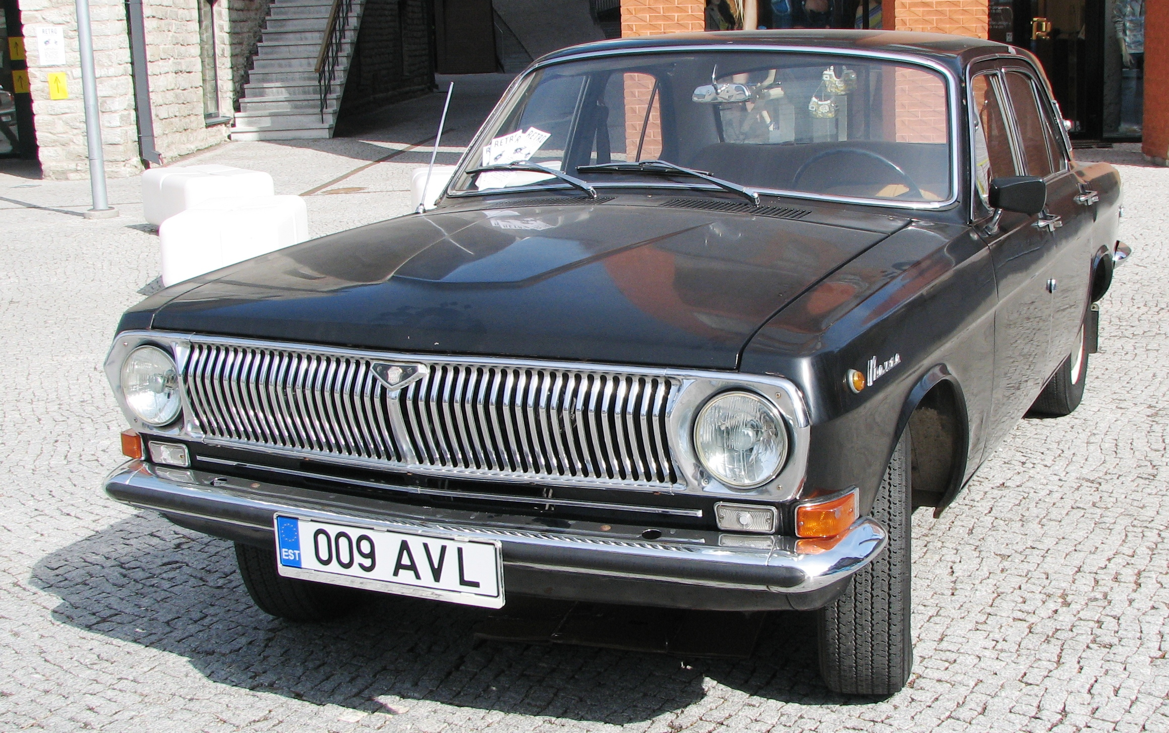 Volga Rotermanni Retro päeval